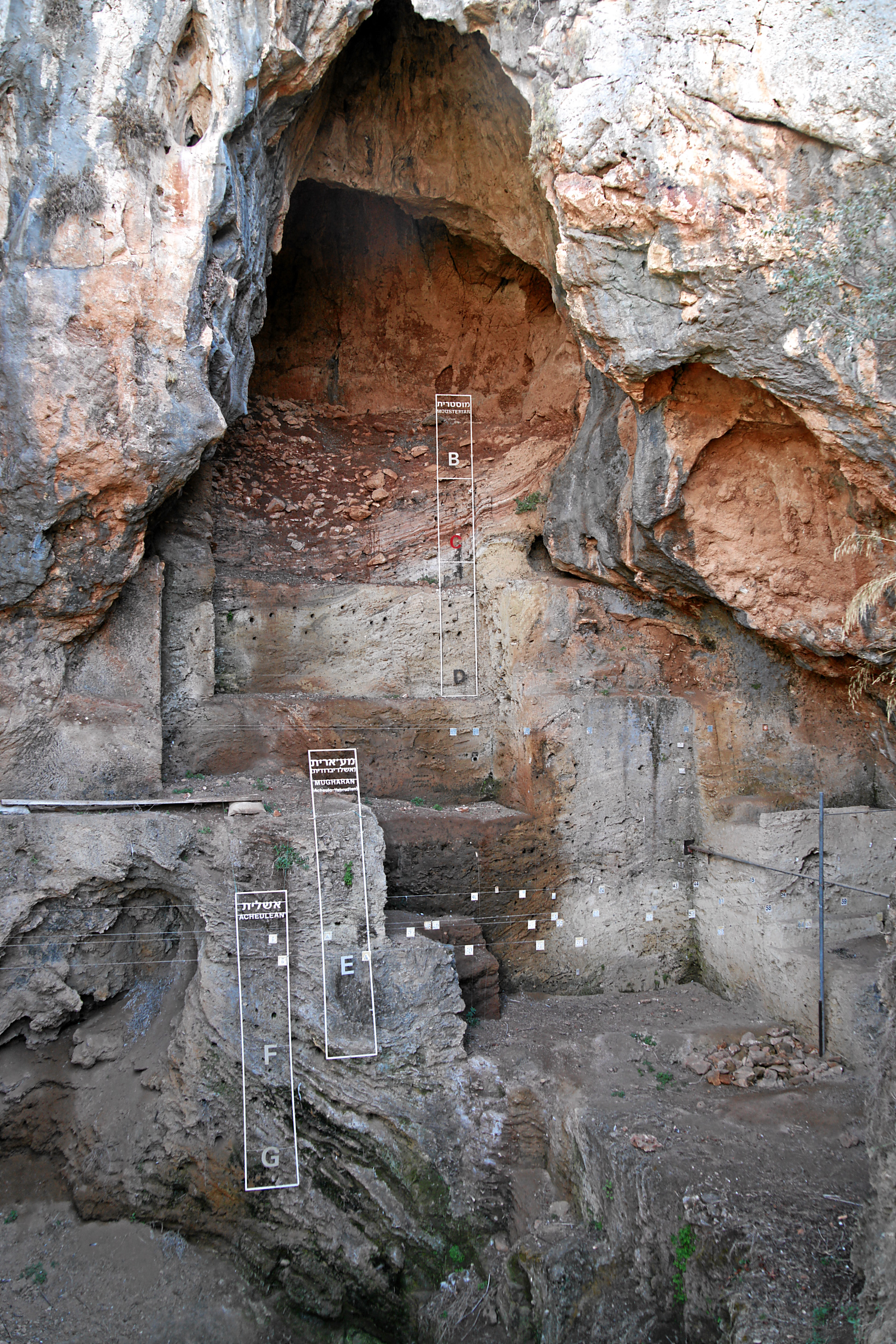 Nahal Me'Arot: Tabun Cave